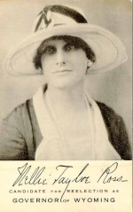 Нелли Тейло Росс